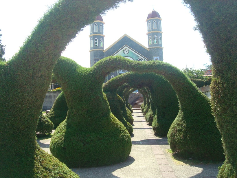 Vista del Parque "Evangelista Blanco" con la Iglesia de San Rafael de fondo. Cantón de Zarcero. Alajuela, Costa Rica.